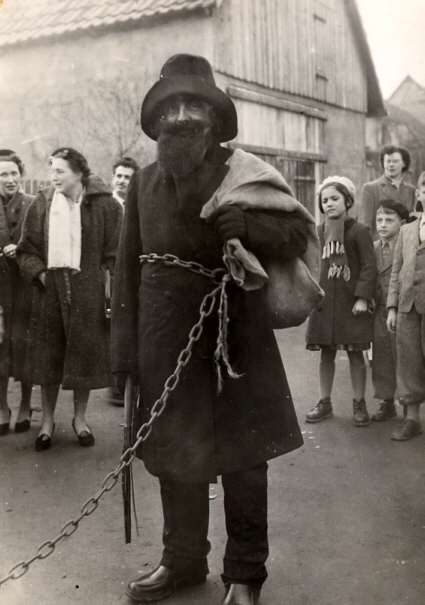 Le Hans Trapp - 1953 à Wintzenheim (Alsace, France)